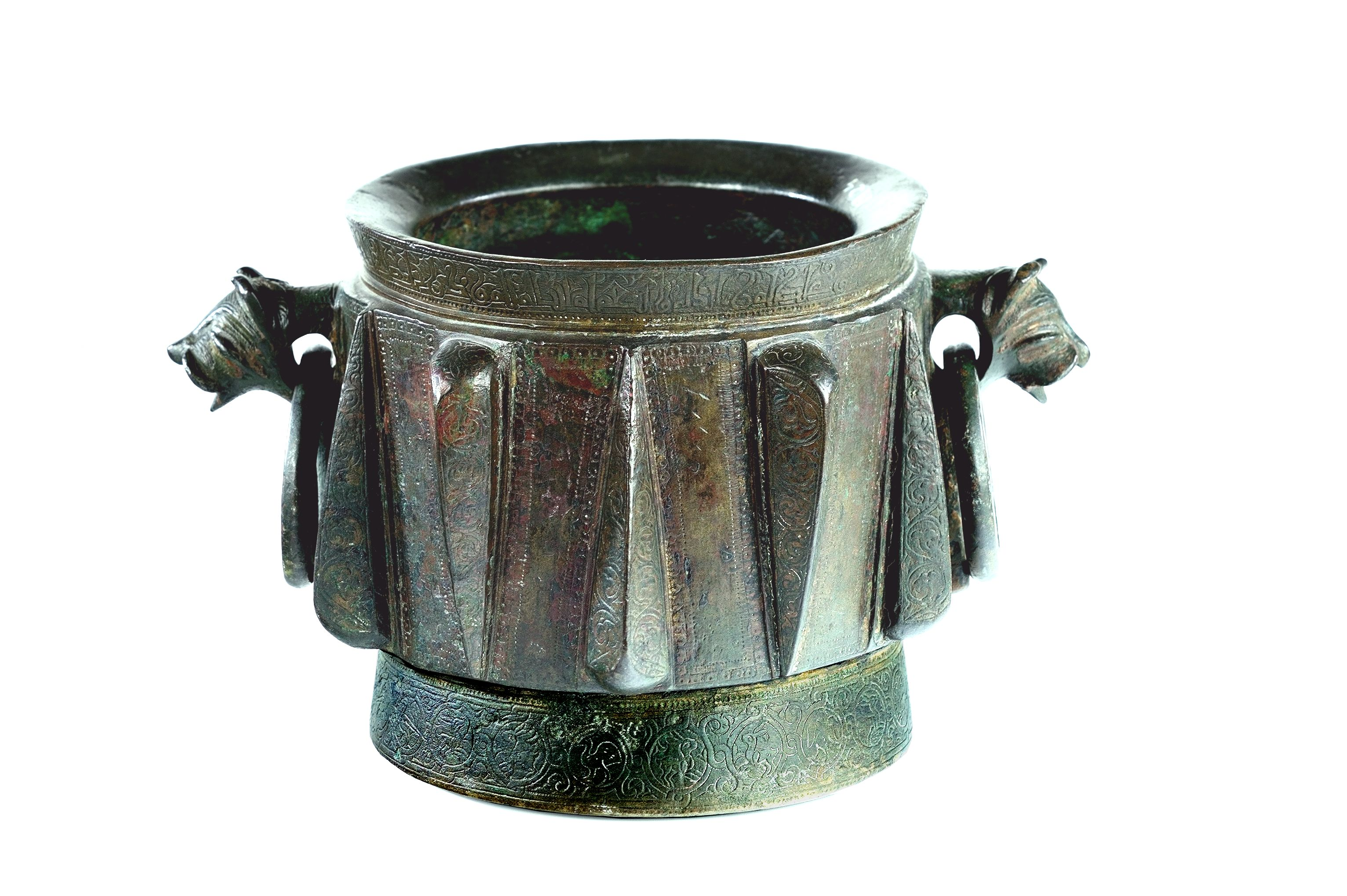 Morter de bronze, de cos cilíndric, base troncocònica i vora lleument exvasada. Compta amb dues grans argolles als laterals, agafades a llurs caps de lleó o de gos. Tot el recipient és recobert d'arabescs vegetals, tot i que la faixa de la base és ornamentada amb sanefa de cercles entrellaçats que inscriuen, alternativament, llebres i ocells. La faixa de la vora superior conté una llegenda de lloança escrita amb caràcters cúfics.